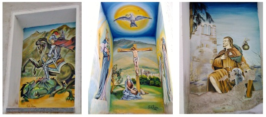 Borgata Pognant (San Giorio di Susa) le tre edicole del Pilone Votivo in Regione Garin.